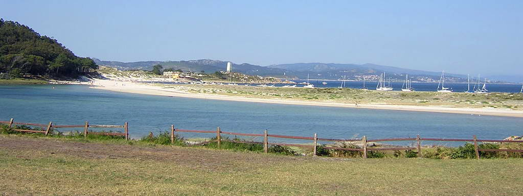 Monteagudo, Illas Cíes, Galiza. El "lago" con la playa das Rodas.